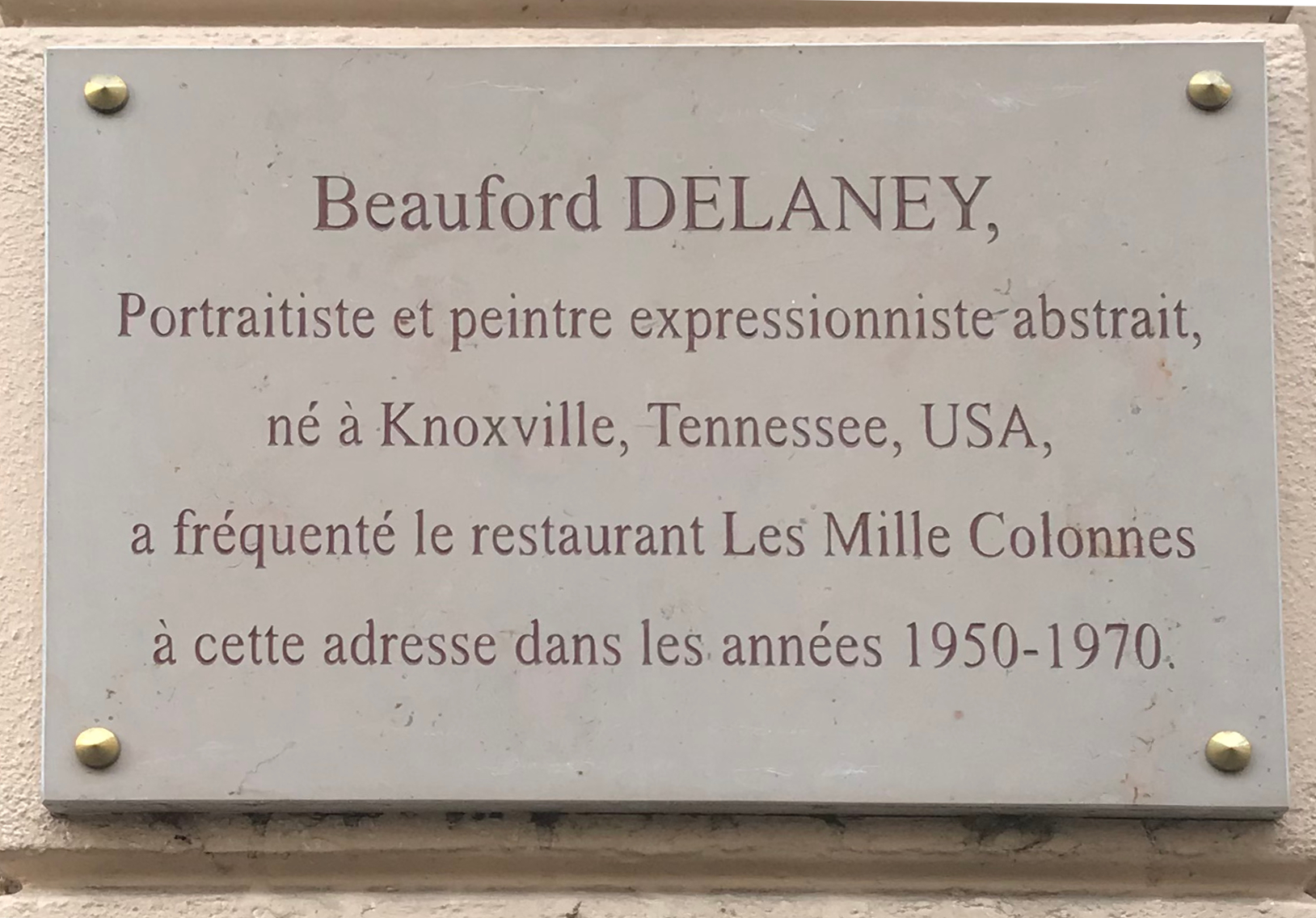 Image de Paris, septembre 2018.